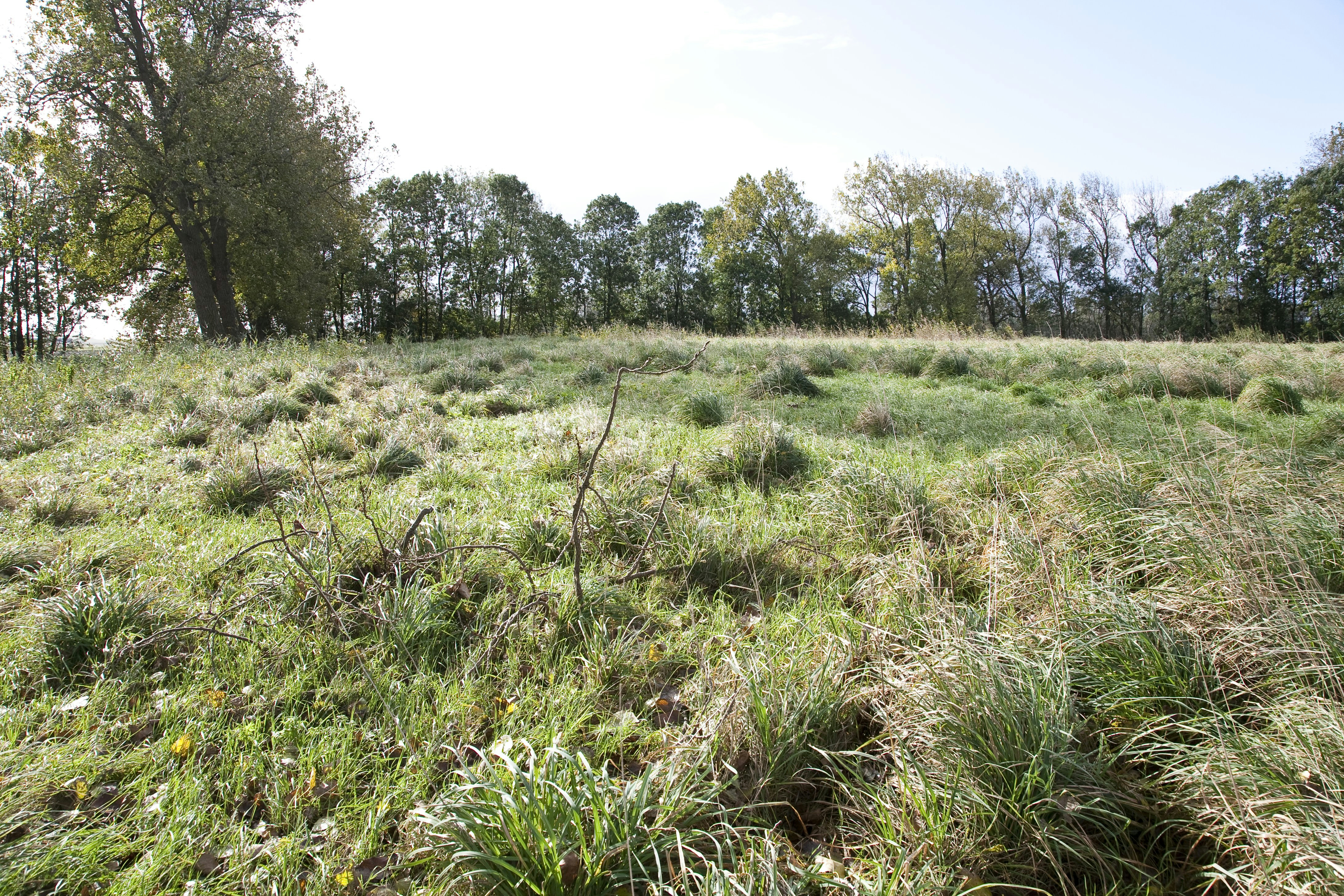 Archeologie/ Hunebed: Klooster van de Johannieters, begin 14e eeuw, gesloopt in 1609. Archeologisch onderzoek (1982-1988), waarbij een hunebed en een steenkist, grafvormen van de Trechterbekercultuur, gevonden zijn. (opmerking: Publicatie: TRAP Appingedam en Delfzijl (Cultuur Historische Routes in Nederland - 59)) This is a possible Rijksmonument: Find the monument in the Monuments database: in Unknown All Rijksmonumenten in Unknown Is this a Rijksmonument? Yes No More information about this project and help. More images to work at in Category:Possible Rijksmonumenten.